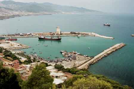 Tenes Port, Algeria